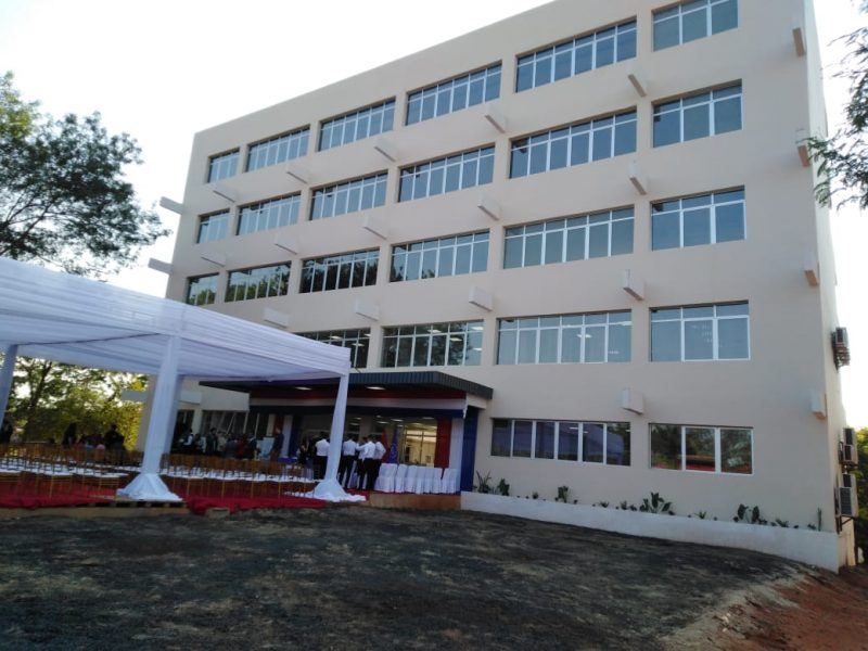 fachada